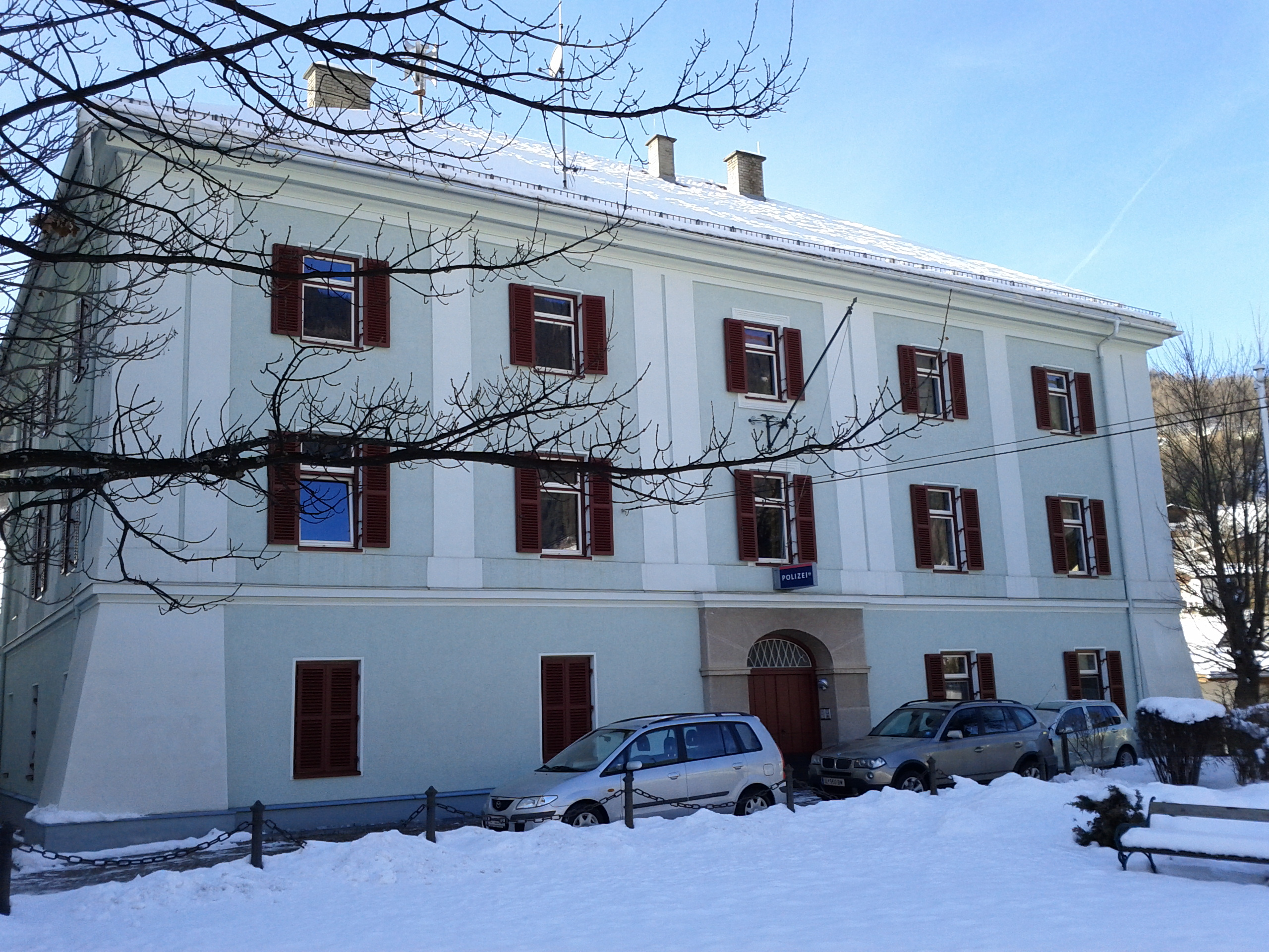 Polizeigebäude, ehem. Bezirksgericht - Steinach am Brenner, Knollerplatz 18